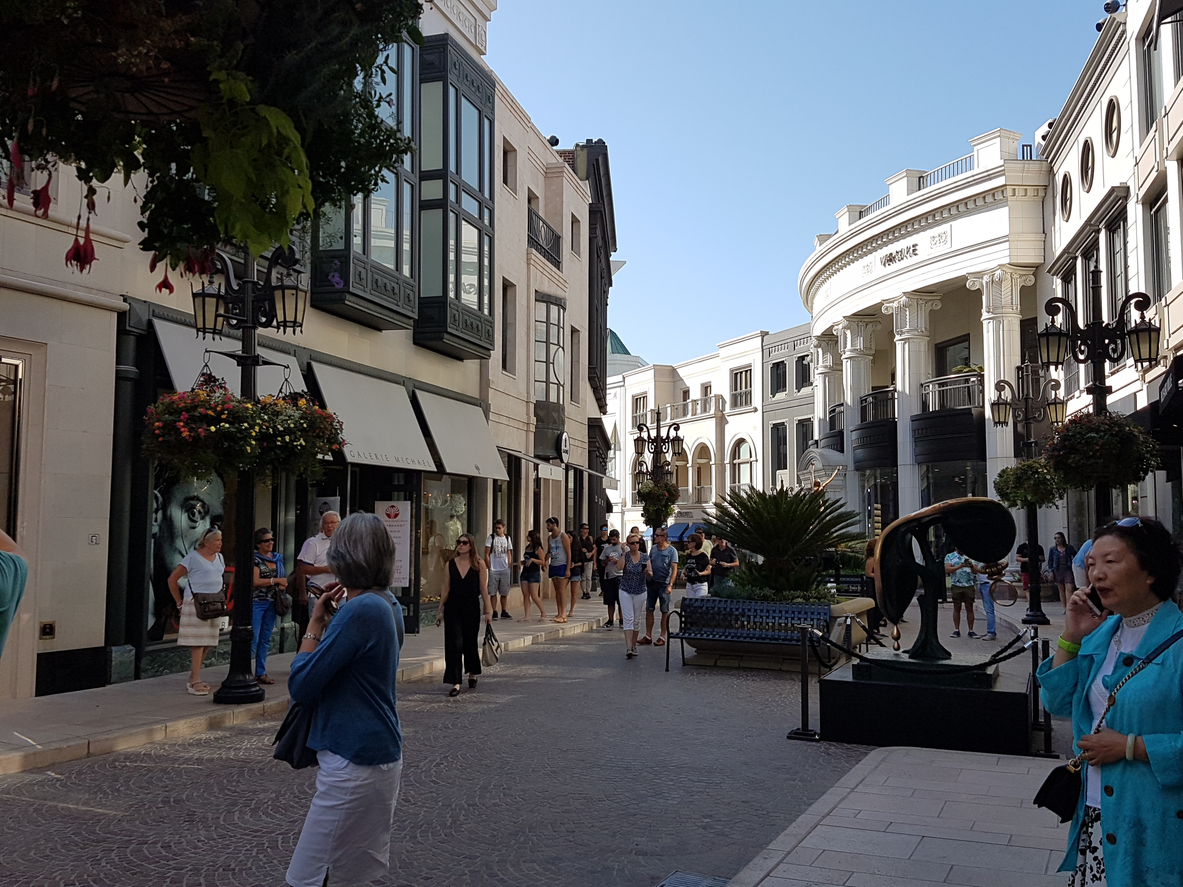 Rodeo Drive in Los Angeles